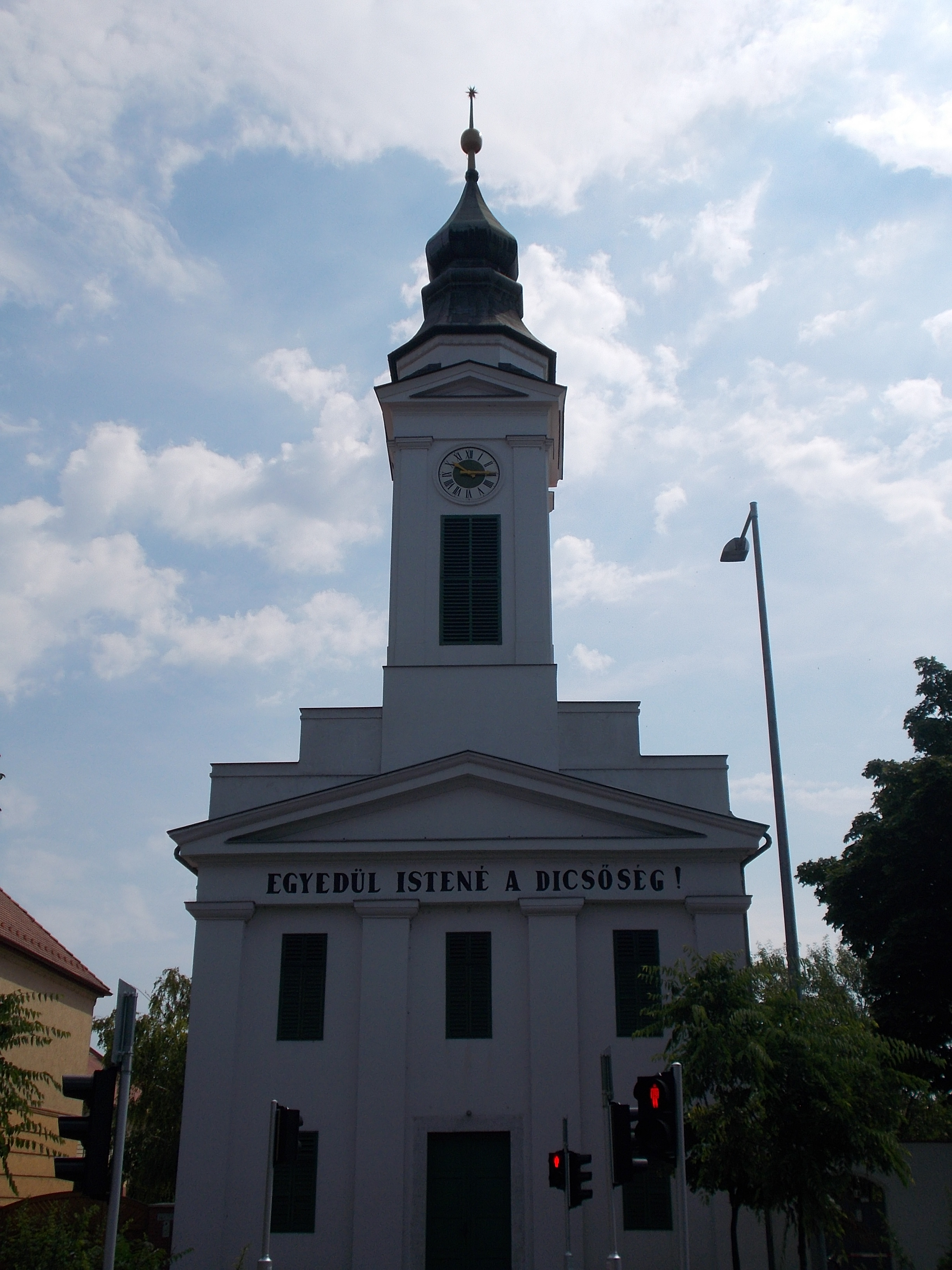 Református templom holokzata. Műemlék ID 3906. Késő klasszicista, 1844. - Magyarország, Fejér megye, Székesfehérvár, Széchenyi utca 18 This is a photo of a monument in Hungary. Identifier: 3906